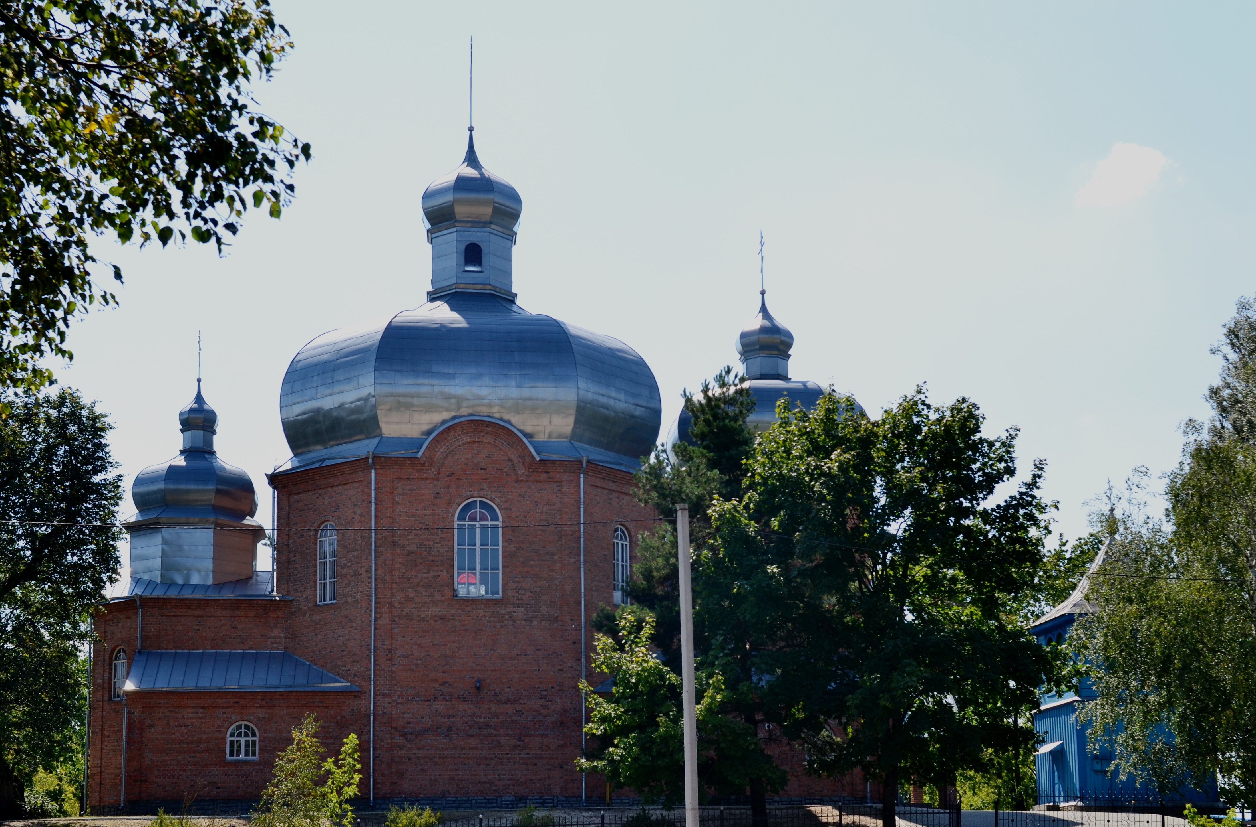 Ансамбль Дмитрівської церкви (1833 рік) - вигляд з півночі - Гірники Ратнівський район Волинська область Україна